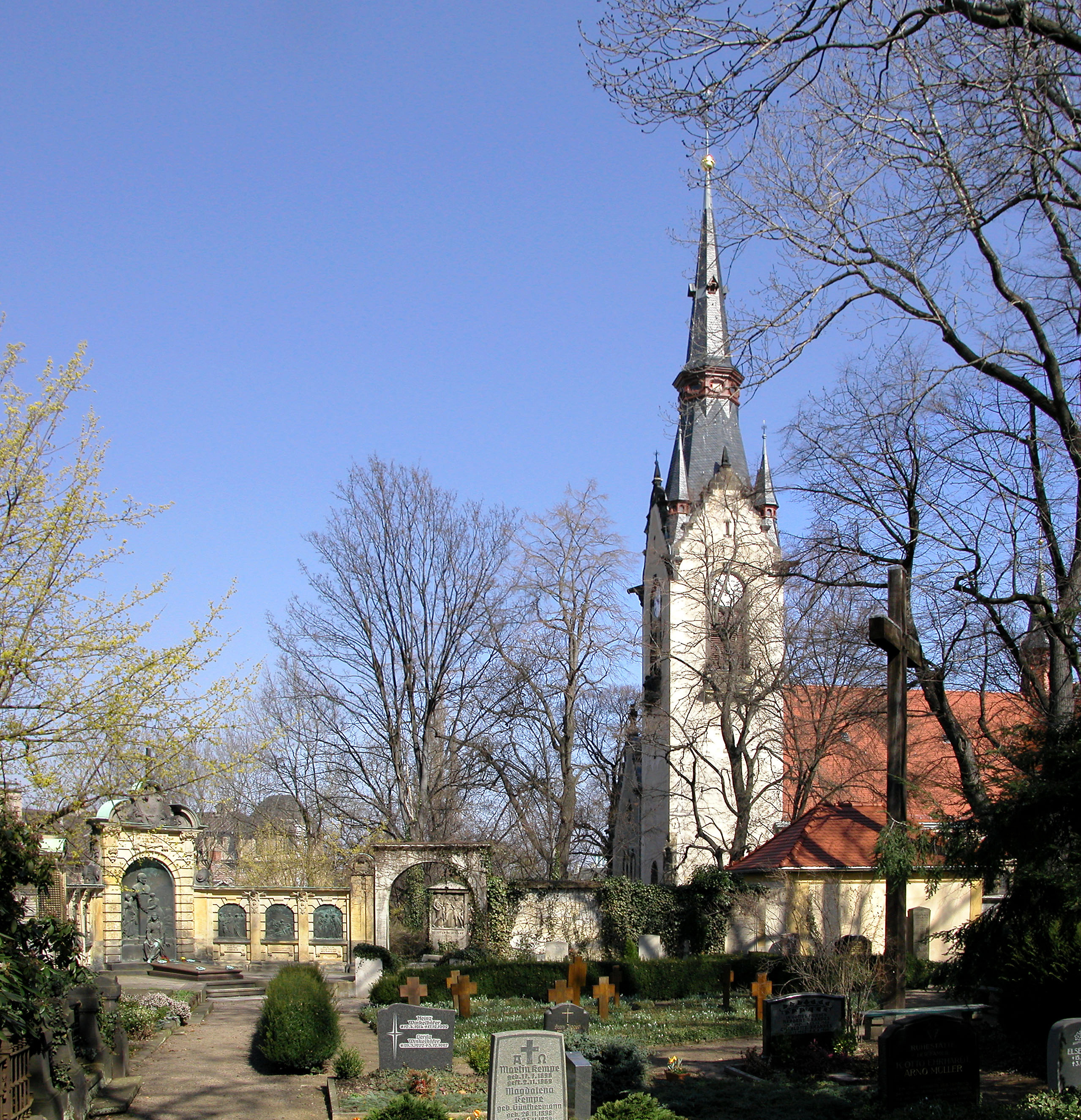 31.03.2005 01187 Dresden-Altplauen, Reckestraße 6 (GMP: 51.028935,13.704658): Ev.-Luth. Auferstehungskirche. 700jährige Vorgeschichte mit vielen Umbauten. Früher hieß sie Michaeliskirche. Nach dem letzten großen Erweiterungsbau erhielt sie 1903 den Namen Auferstehungskirche. Architekten waren William Lossow und Hermann Viehweger. Links das Bienert Grabmal. Sicht von Süden. [DSCN6138-6139.TIF]20050331072MDR.JPG(c)Blobelt